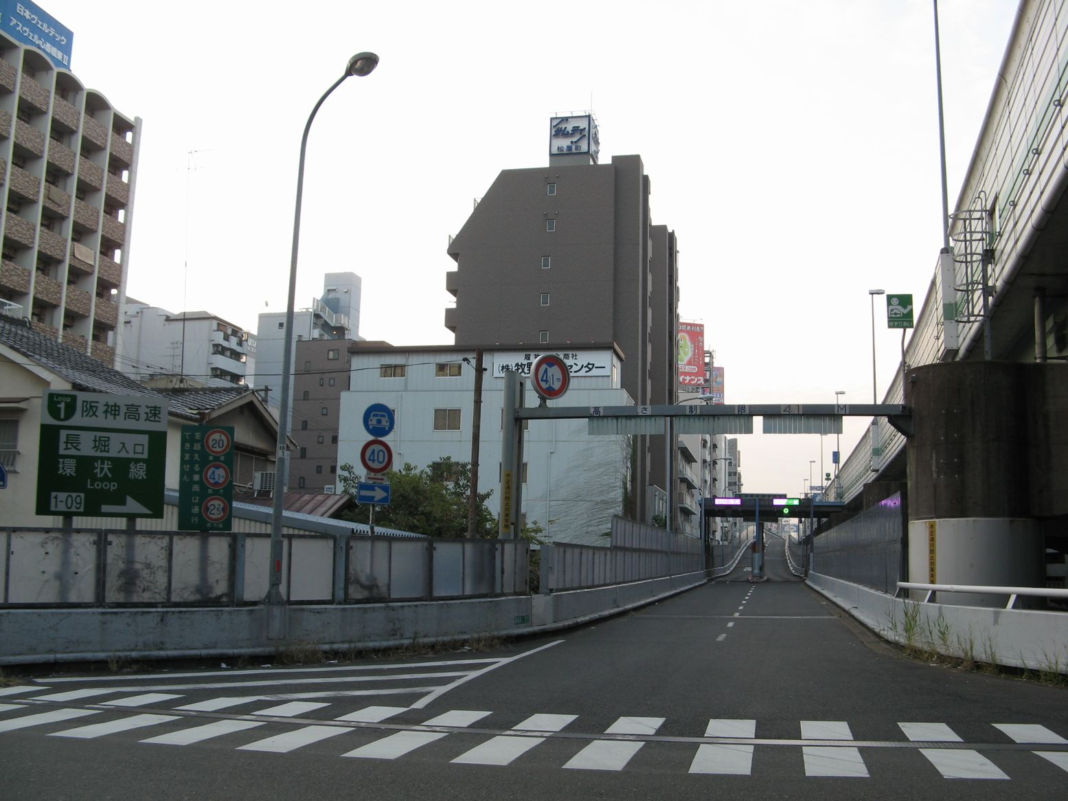 阪神高速長堀入口 南望